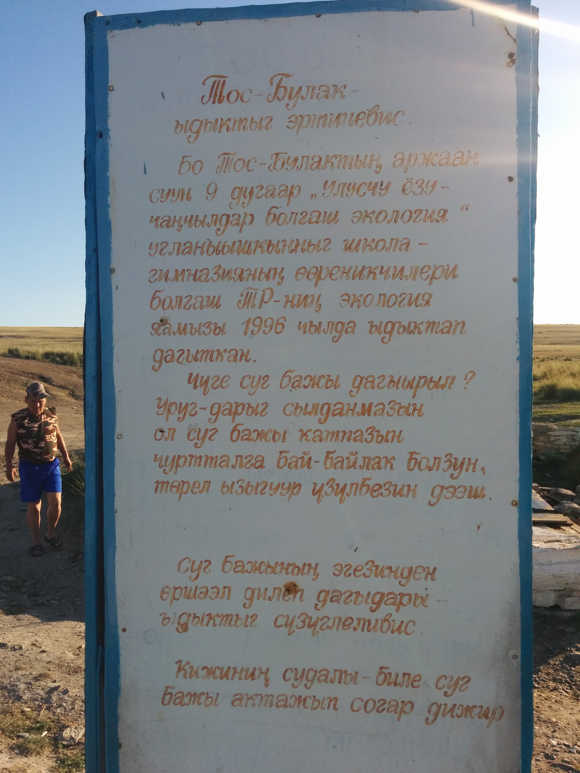 Тыва дыл: Тос-Булак аржаан. 2014